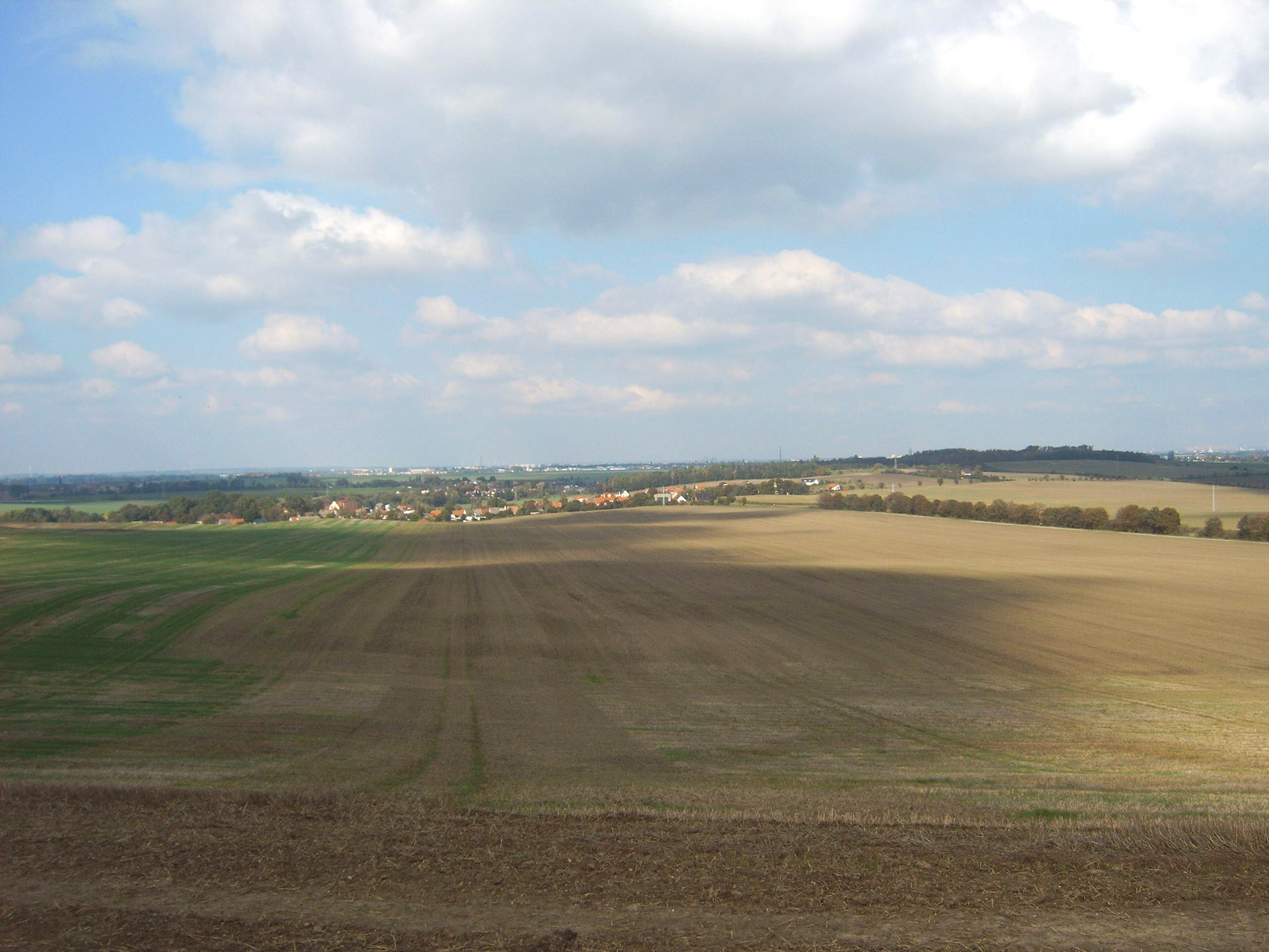 Blick vom Kreuzberg auf Beyendorf-Sohlen, Sachsen-Anhalt, Deutschland